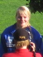 Tanja Mäkinen Kalevan kisoissa, Ratinan stadionilla, Tampereella, 26. heinäkuuta 2008